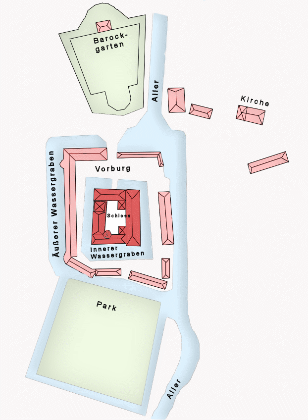 Schlossanlagen der Wolfsburg um 1750